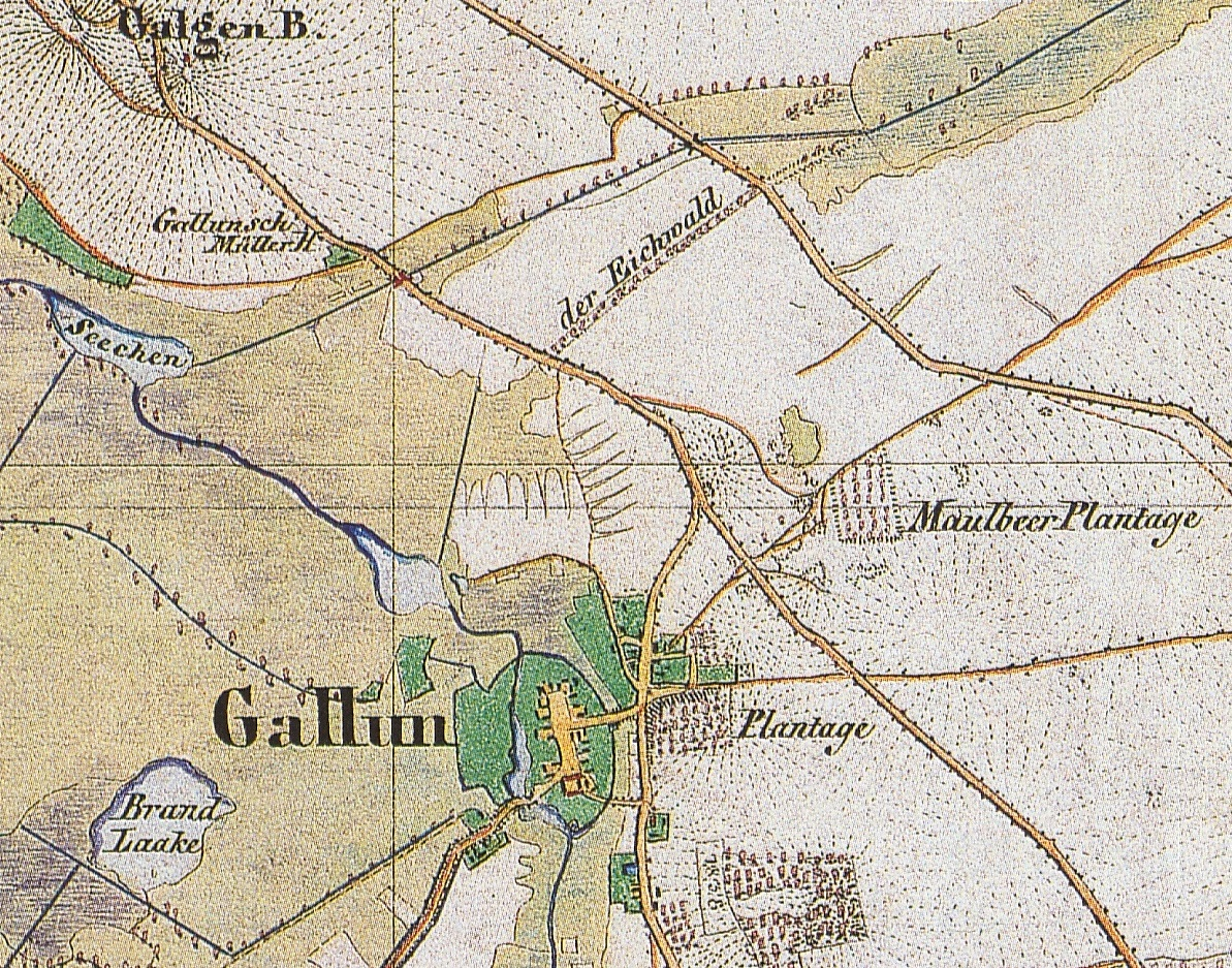 Gallun, Stadt Mittenwalde, Lkr. Dahme-Spreewald, Brandenburg, Ausschnitt aus dem Urmesstischblatt 3747 Königs Wusterhausen von 1839